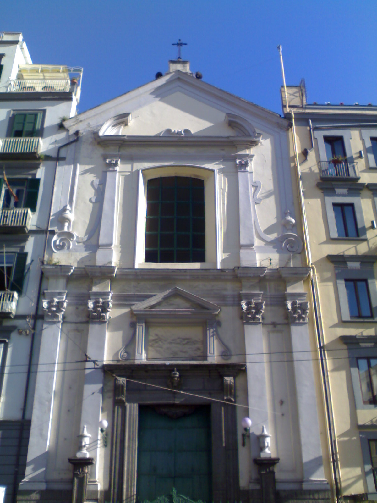 Chiesa Pietà dei Turchini (Napoli)